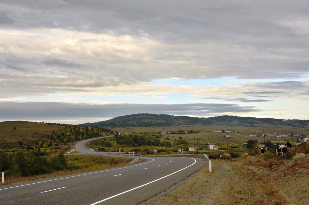 Трасса Амур Р297